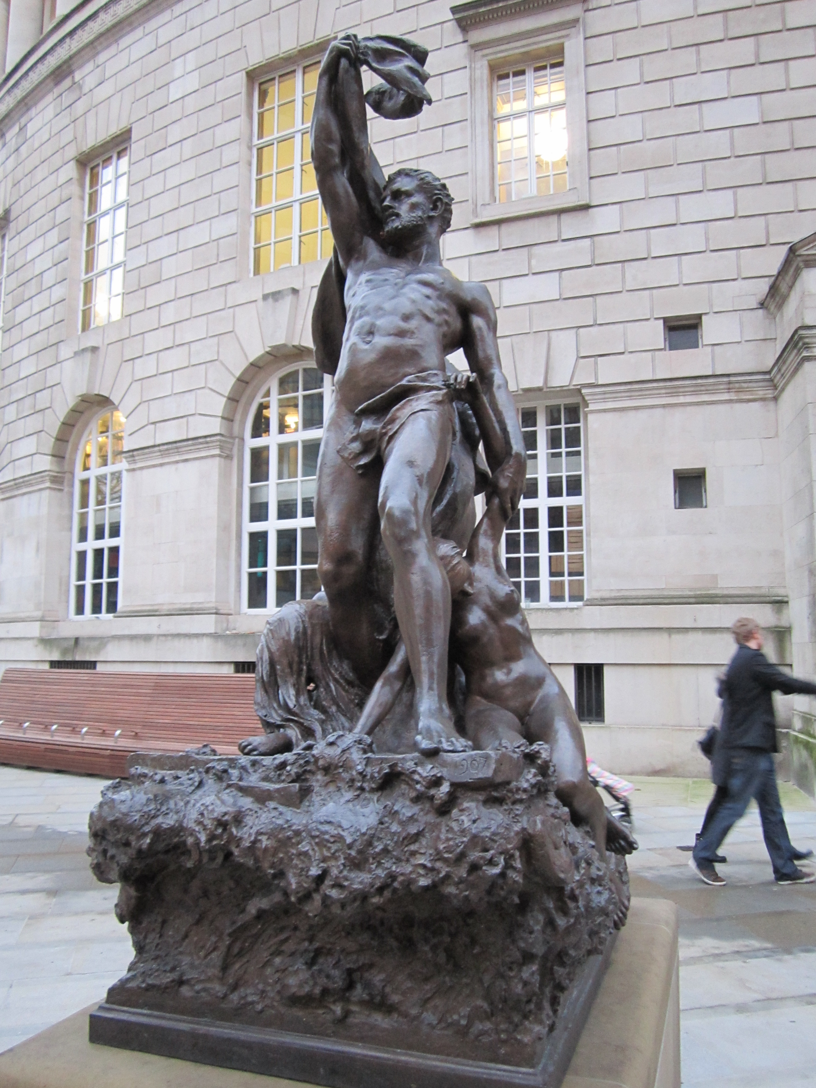 Adrift statue, Manchester, England.